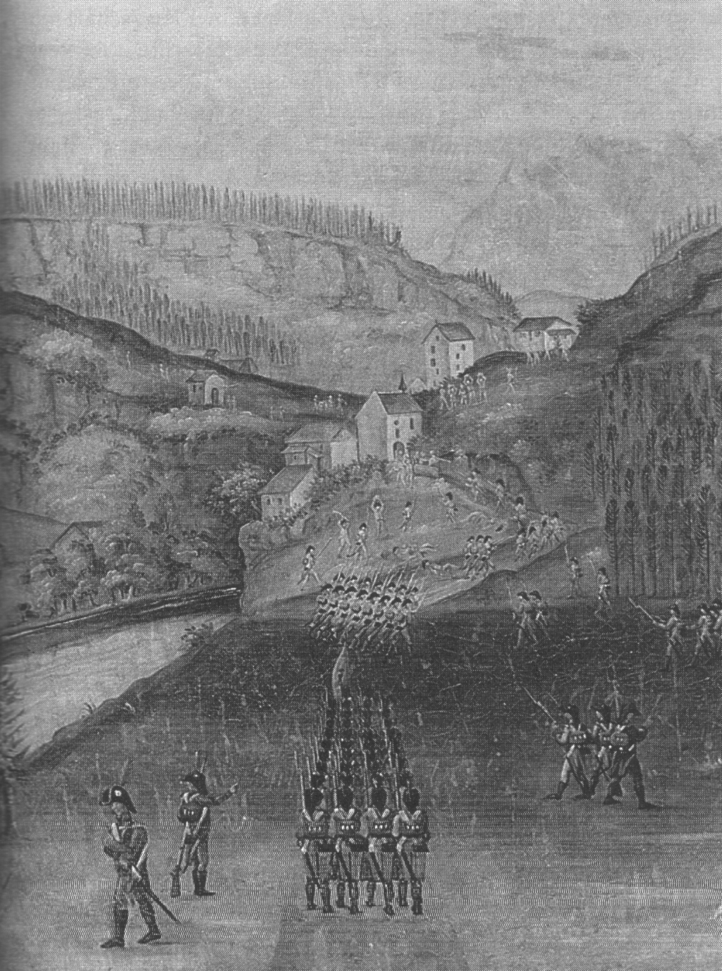 Tosters, Schlacht am Margarethenkapf 1799, Auszug aus Votivbild Kapelle St. Michael Tisis